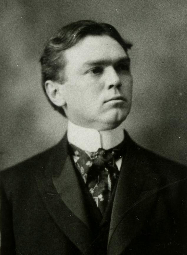 Rep. R.B. Albertson